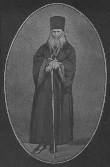 Николай Сергеевич Виноградов (1818—1880) — священника села Чамерово Весьегонского уезда (1841—1870), а после Богоявленского собора города Весьегонска (1871—1880) Тверской губернии. Отец искусствоведа и китаеведа иеромонаха Алексия и патологоанатома Константина.